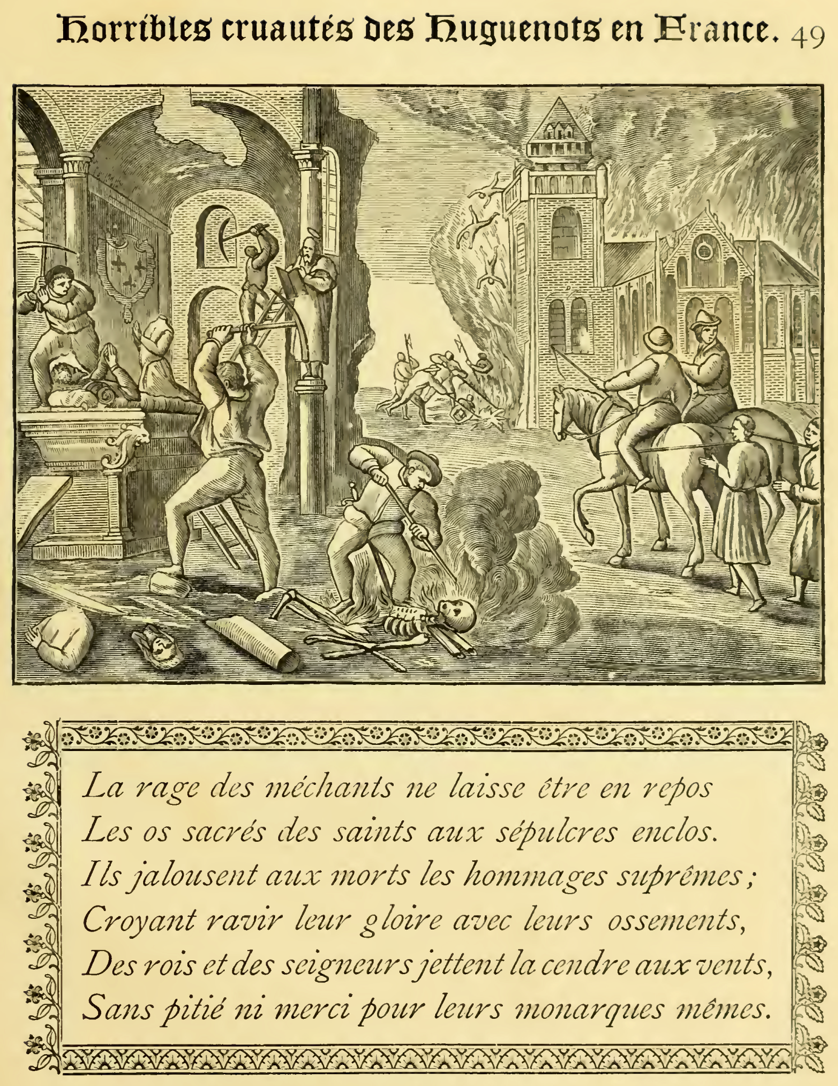 Horribles cruautés des Huguenots en France: A. À Cléry, après avoir dévasté l'intérieur de l'église et pillé out ce qu'elle renfermait de précieux, tant reliques qu'autres objets servant au culte, ils brisèrent le tombeau du roi de France Louis, onzième du nom, et brûlèrent ses ossements, comme s'ils voulaient effacer à toujours sa mémoire. Ailleurs ils n'épargnèrent même pas les ancêtres du roi de Navarre leur chef (tant ils sont remplis d'inhumanité) ; ni semblablement la sépulture du comte Jean d'Angoulême, homme de très bonne et sainte vie. B. En un village appelé Pat, distant de six ou sept milles d'Orléans, vingt-cinq catholiques poursuivis par ces forcenés, ne trouvant autre lieu de retraite, se réfugièrent dans l'église. De ce nombre étaient quelques enfants lesquels, pour se sauver, montèrent dans le clocher. Mais les ennemis ayant mis le feu à l'église, ces pauvres enfants, contraints par la flamme qui les gagnait et la fumée qui les étouffait, se précipitèrent en bas; et, tombés entre les griffes de ces tigres cruels, furent jetés dans le feu où ils finirent leurs jours. C. Plusieurs prêtres furent attachés avec des licous, et traînés ainsi derrière les chevaux. La rage des méchants ne laisse être en repos Les os sacrés des saints aux sépulcres enclos. Ils jalousent aux morts les hommages suprêmes, Croyant ravir leur gloire avec leurs ossements, Des rois et des seigneurs jettent la cendre aux vents. Sans pitié ni merci pour leurs monarques mêmes.